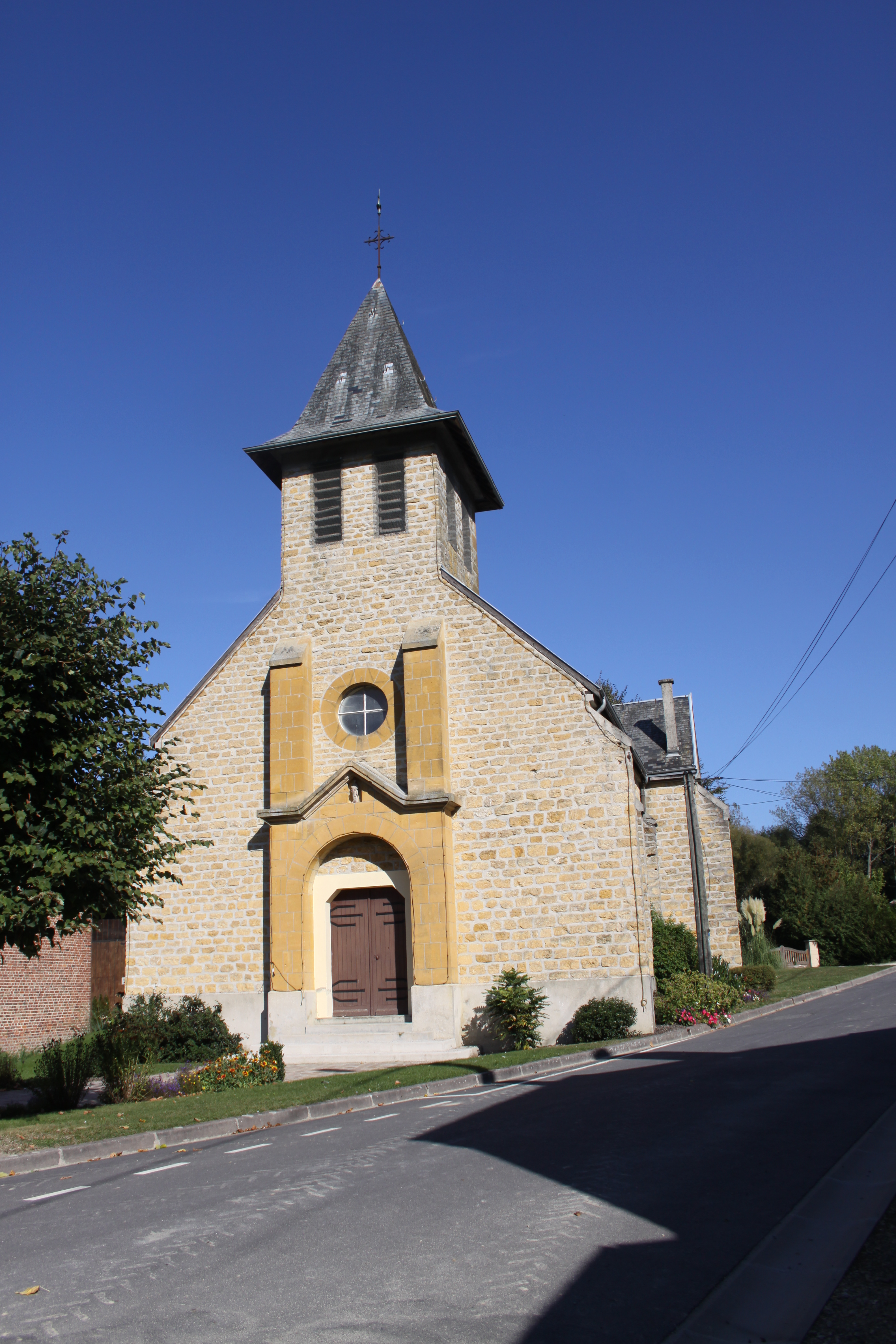 Village Ardennais